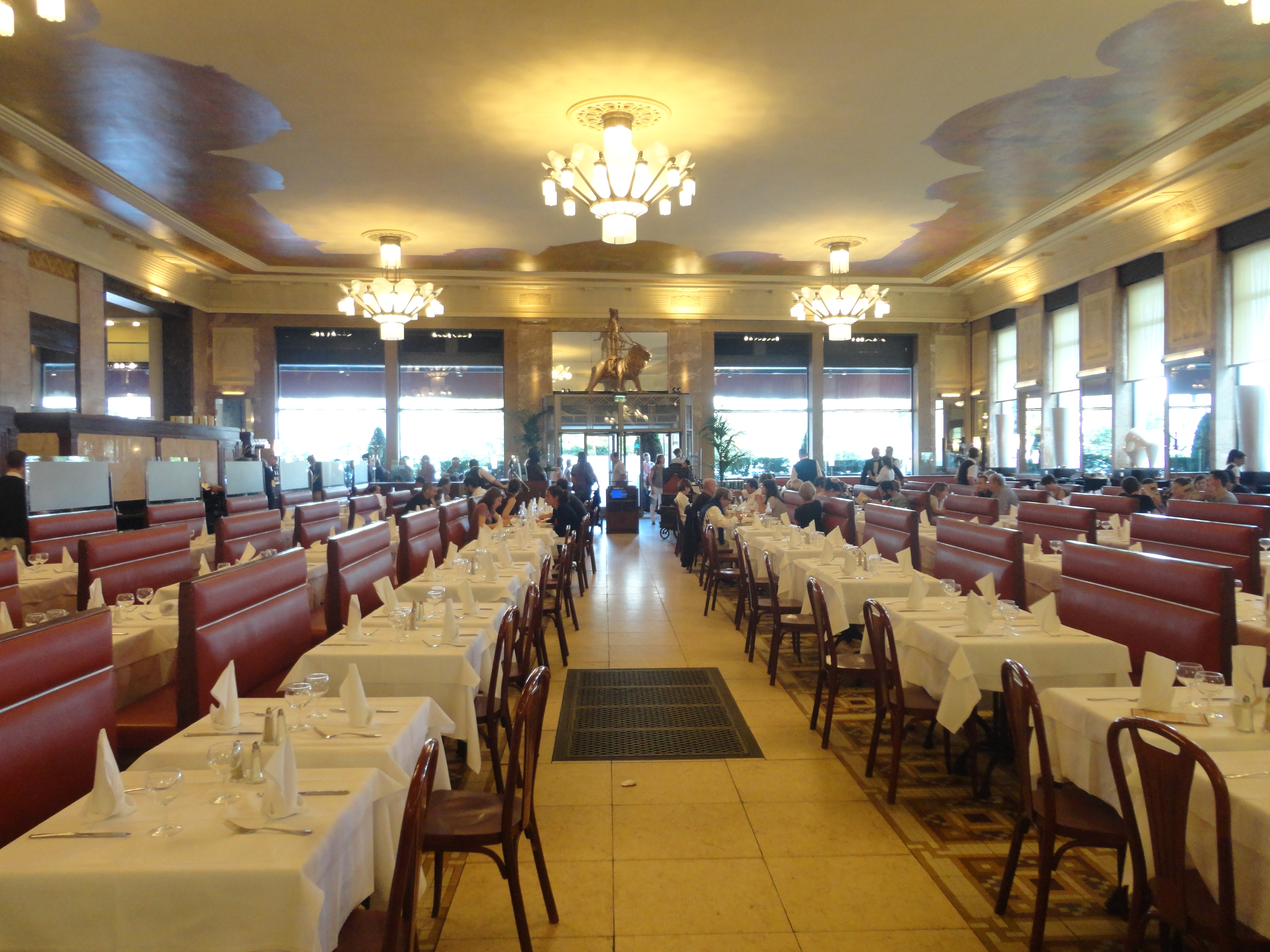 Salle de la Brasserie Georges à Lyon (France).